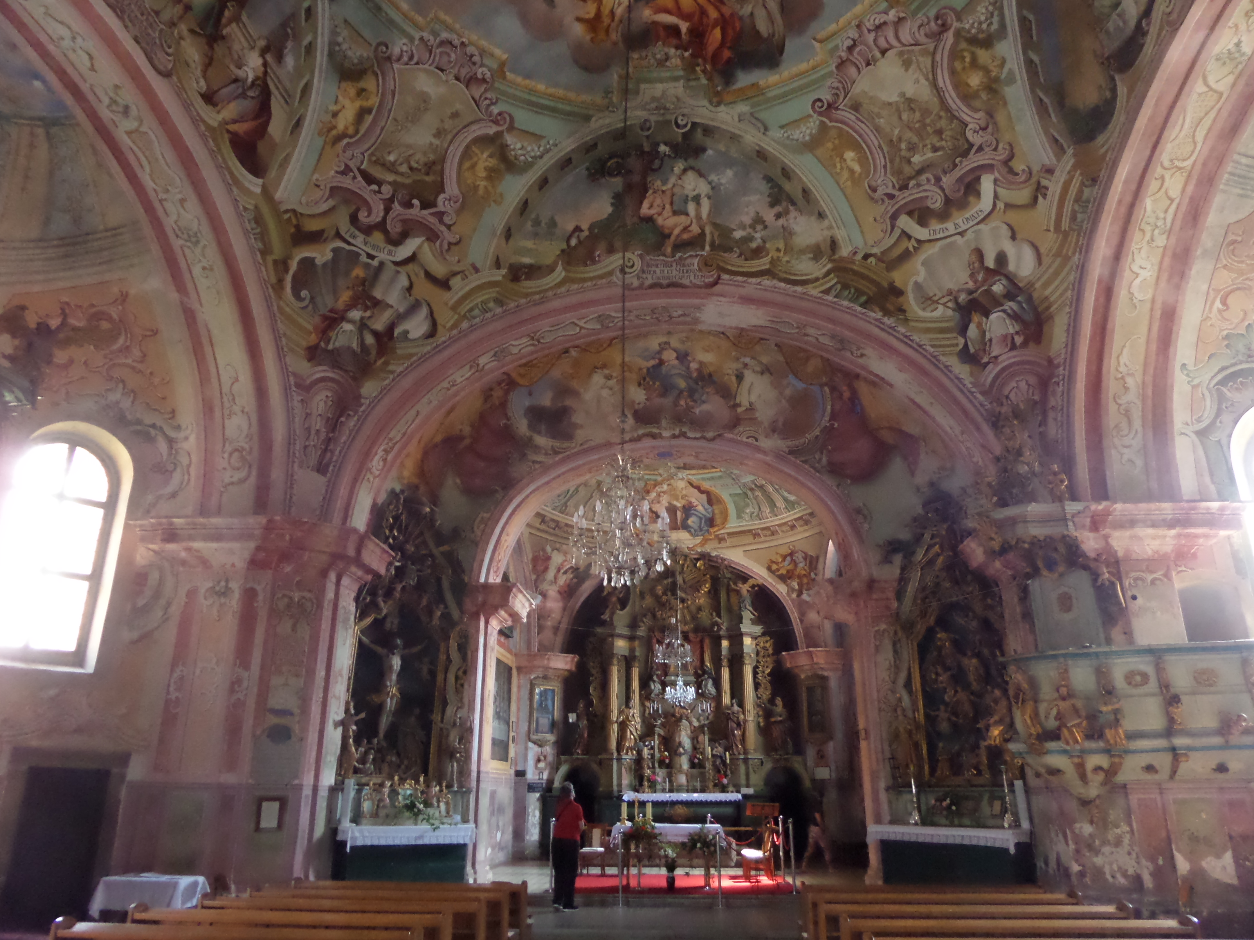 16.08.2016. - Krapina ,Trški Vrh, Kroatien